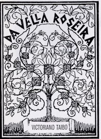 Da vella roseira de Victoriano Taibo